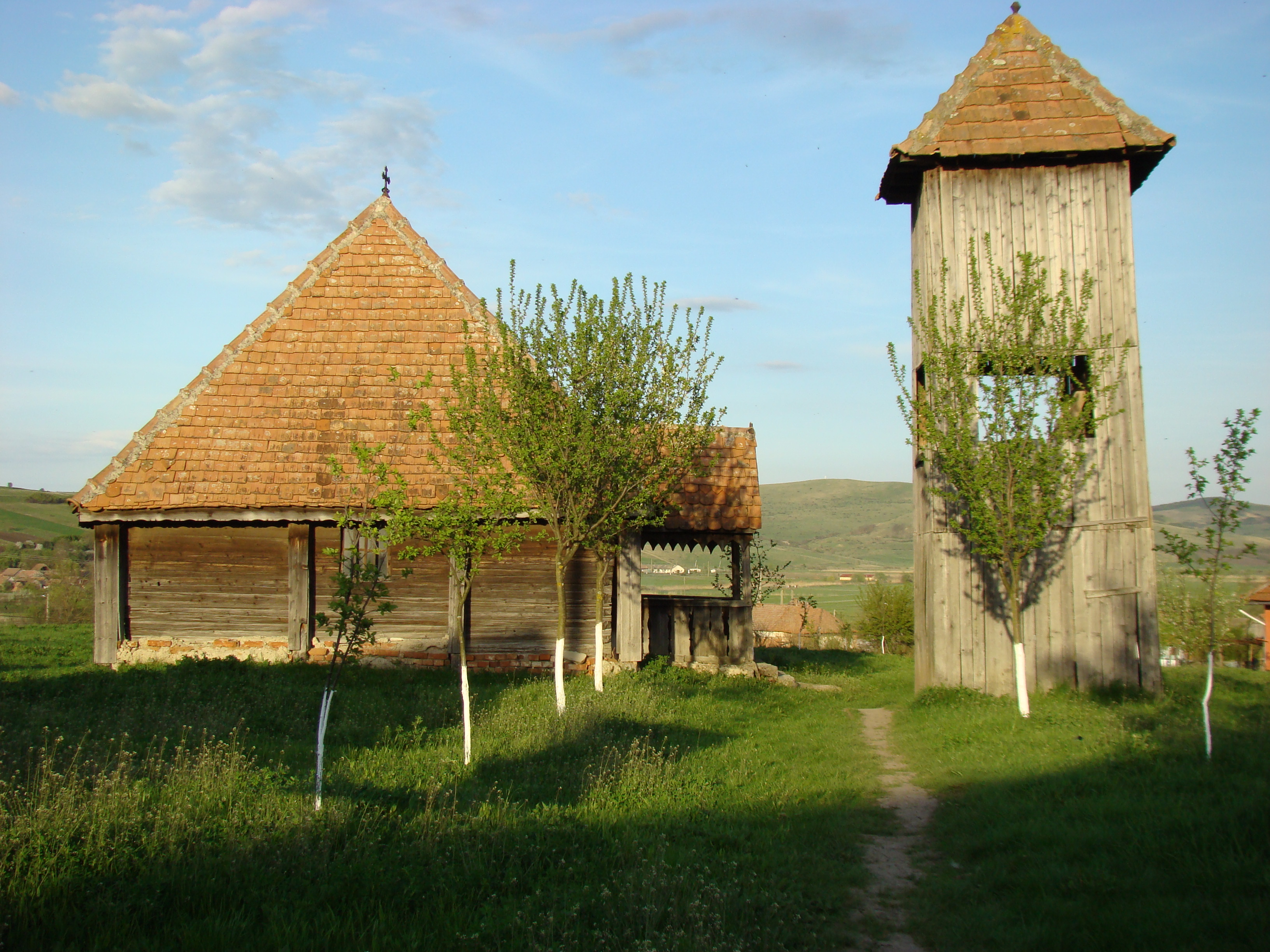 Biserica de lemn din Tău